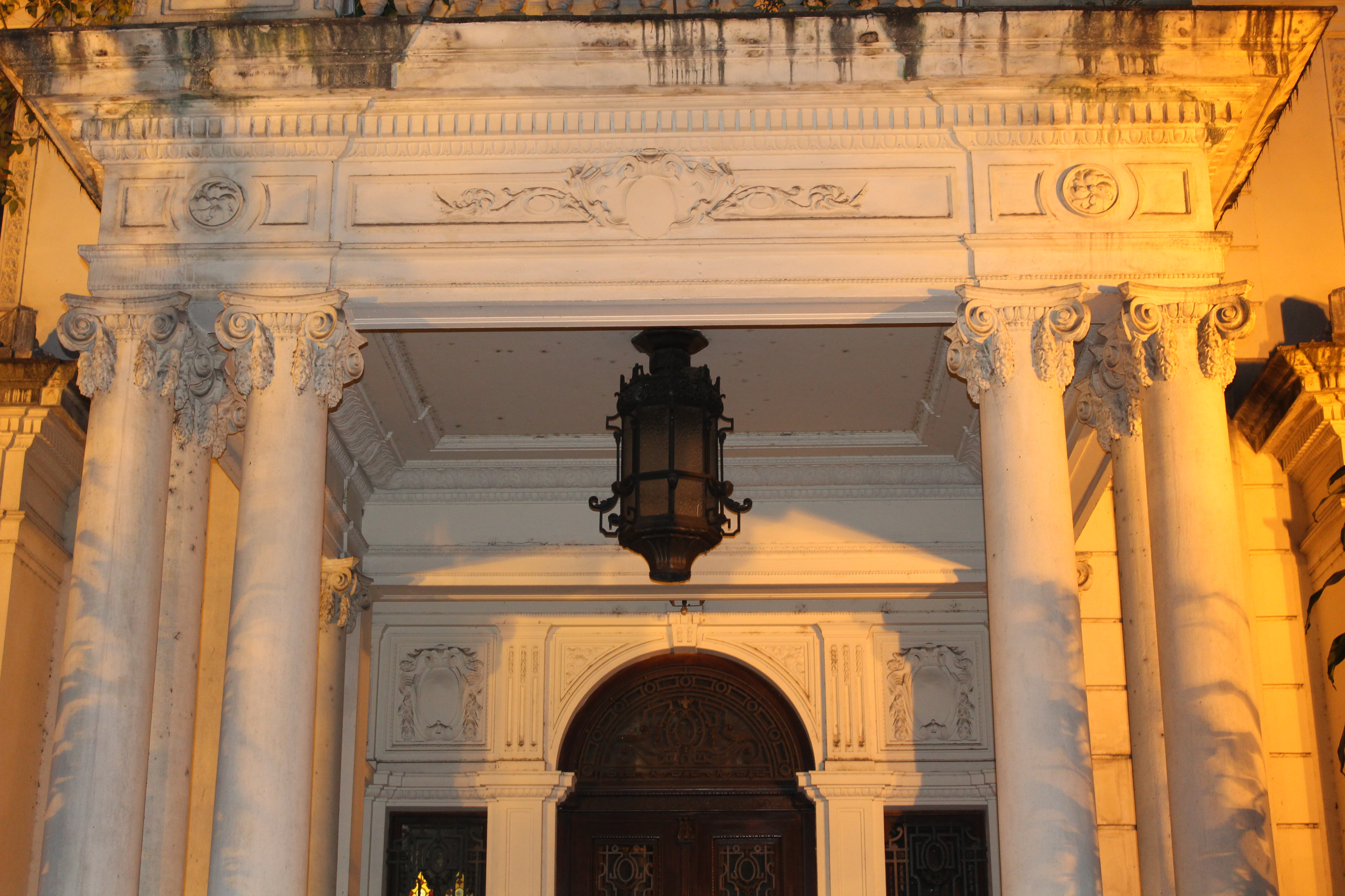 Arquitetura externa da porta de entrada da Casa de Nhonhô Magalhães, localizada no bairro de Higienópolis, em São Paulo, Brasil. Detalhe para o lustre da construção original no século XX.